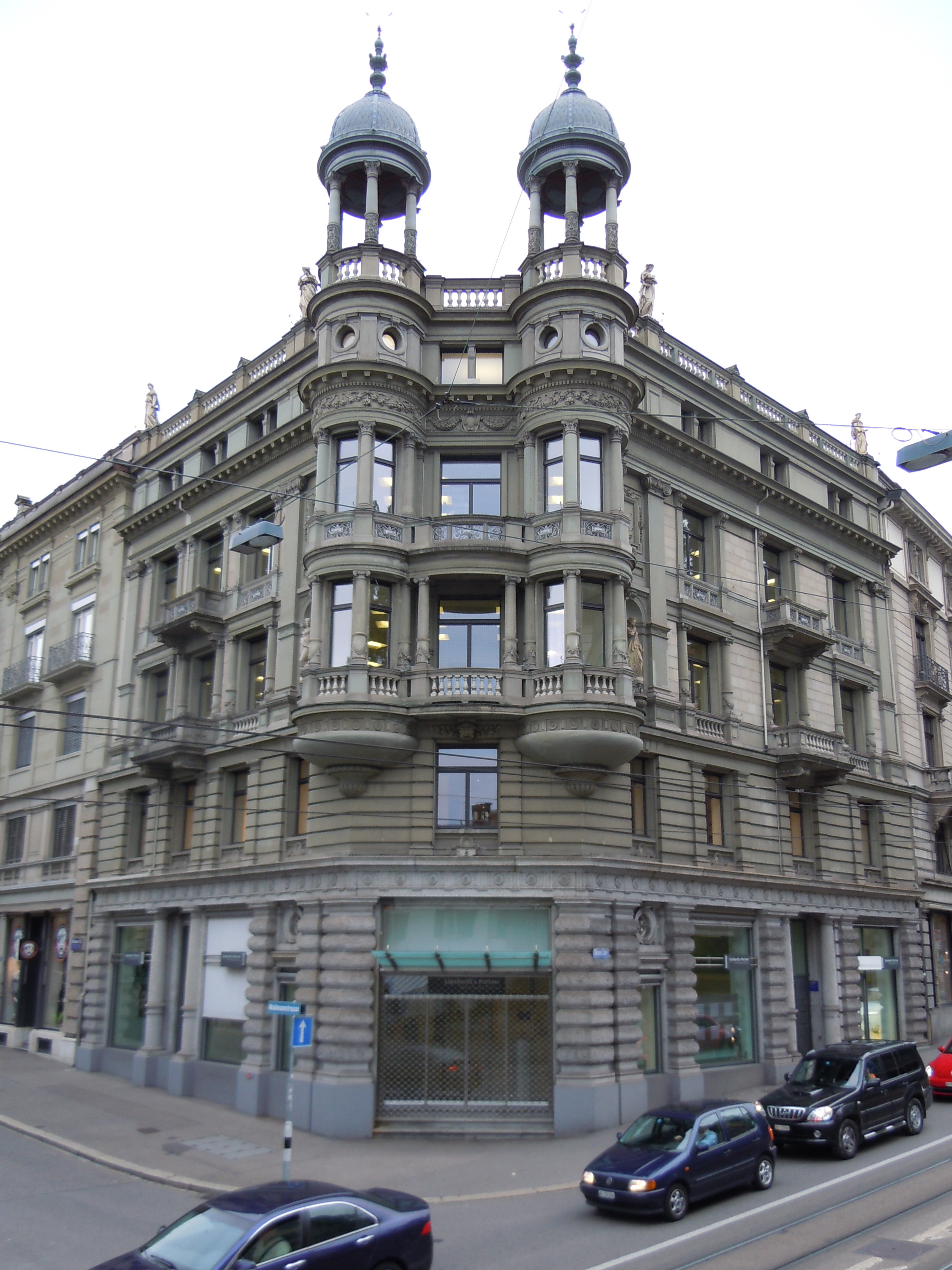 Gewerbebank Rämistrasse 23 , Zürich